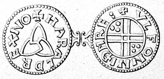 Pfennig-Münze von Harald III. Hardråde, 1047-1066 König von Norwegen. Münzmeister: Ulf von Nidaros. Text: Adv: + HARALD REX NO(rvegiae). Rev: + VLF ON NIDARNE(s).